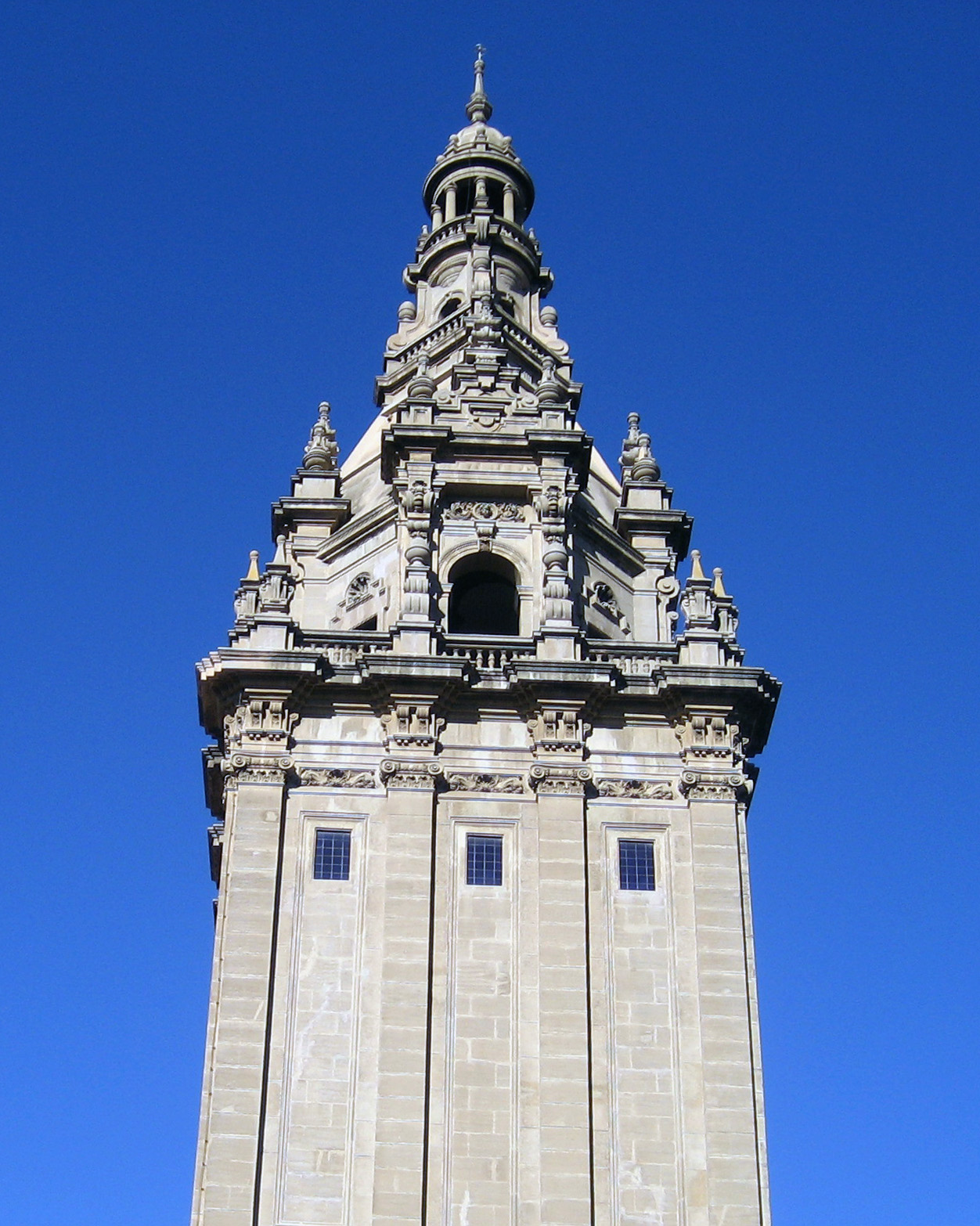 Una de las Torres del Palacio Nacional de Barcelona, Cataluña